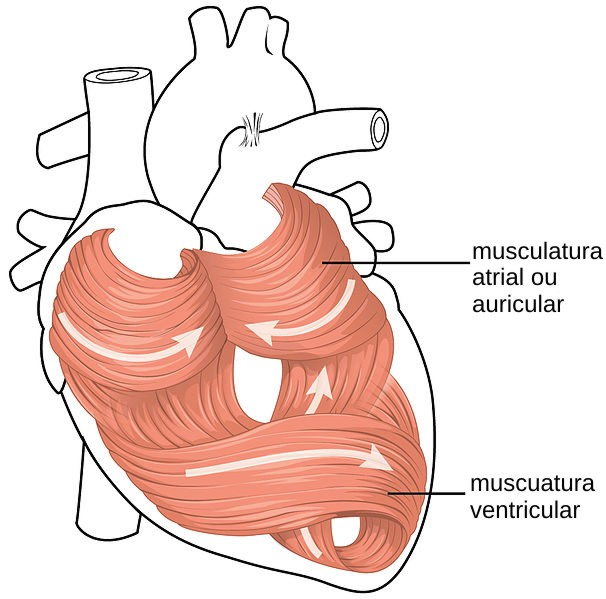 músculatura da parede do corazón